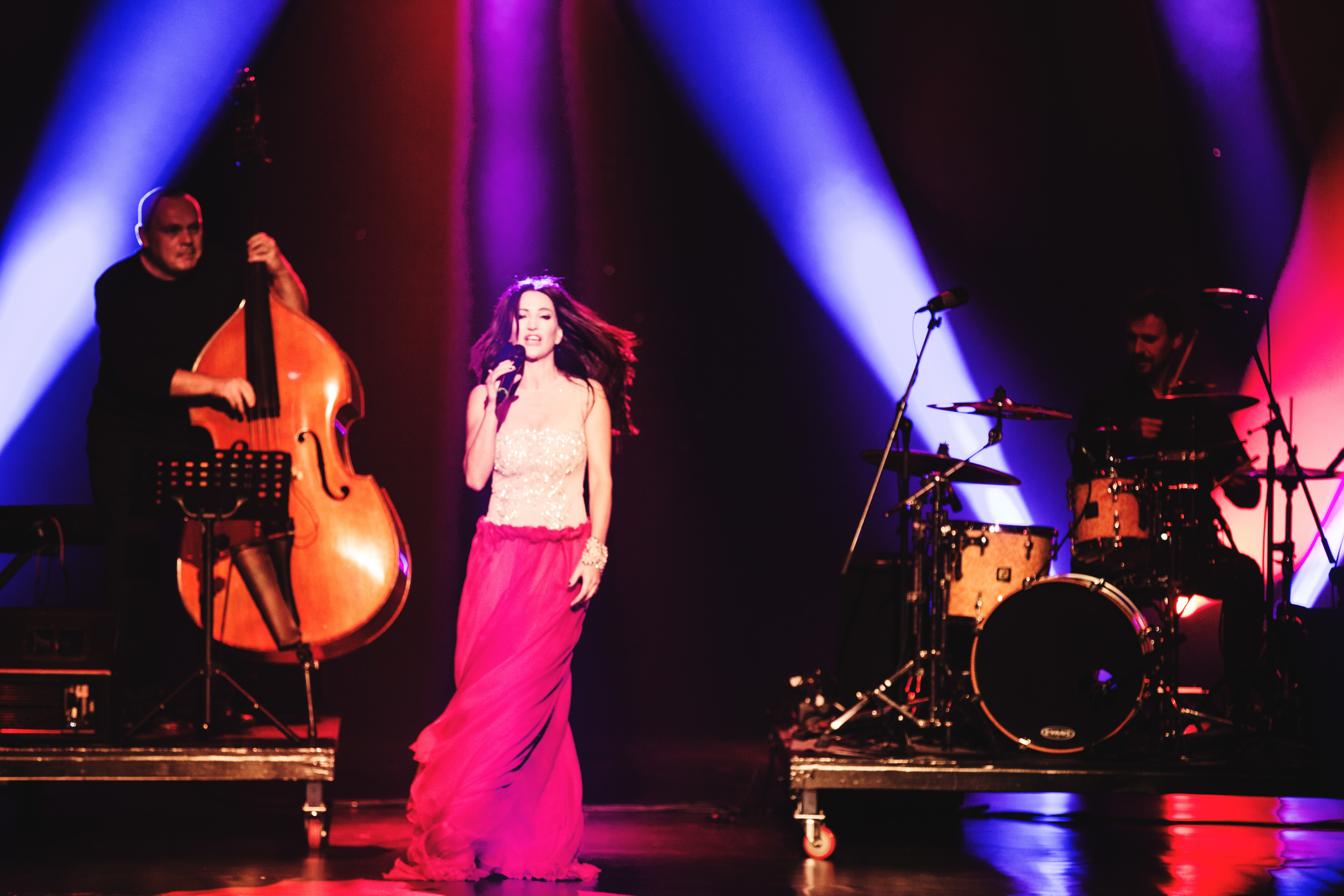 Justyna Steczkowska polska piosenkarka